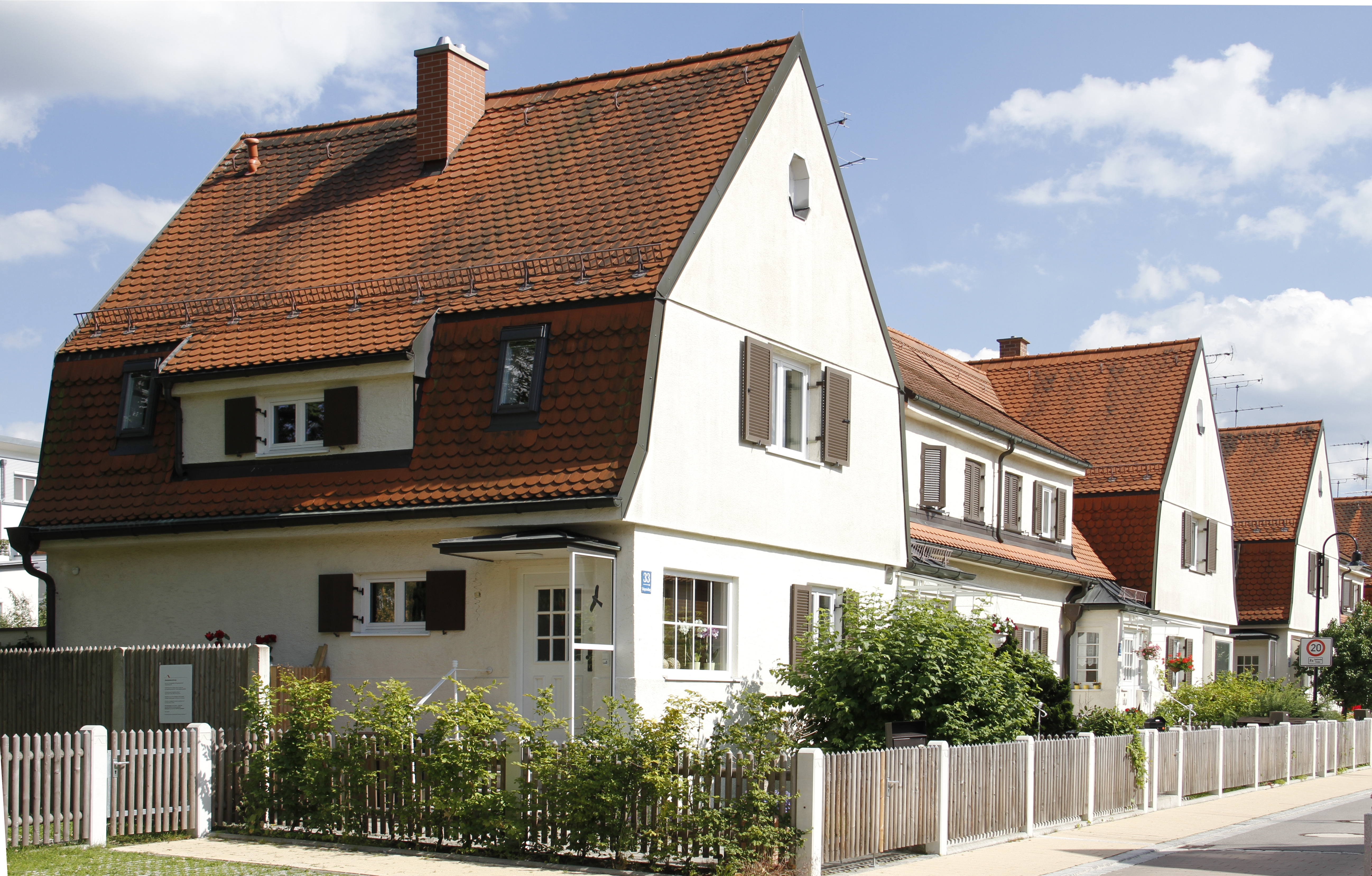 Kriegersiedlung in München, errichtet bis 1927. Vierfamilien-Haus aus dem Bauabschnitt 2